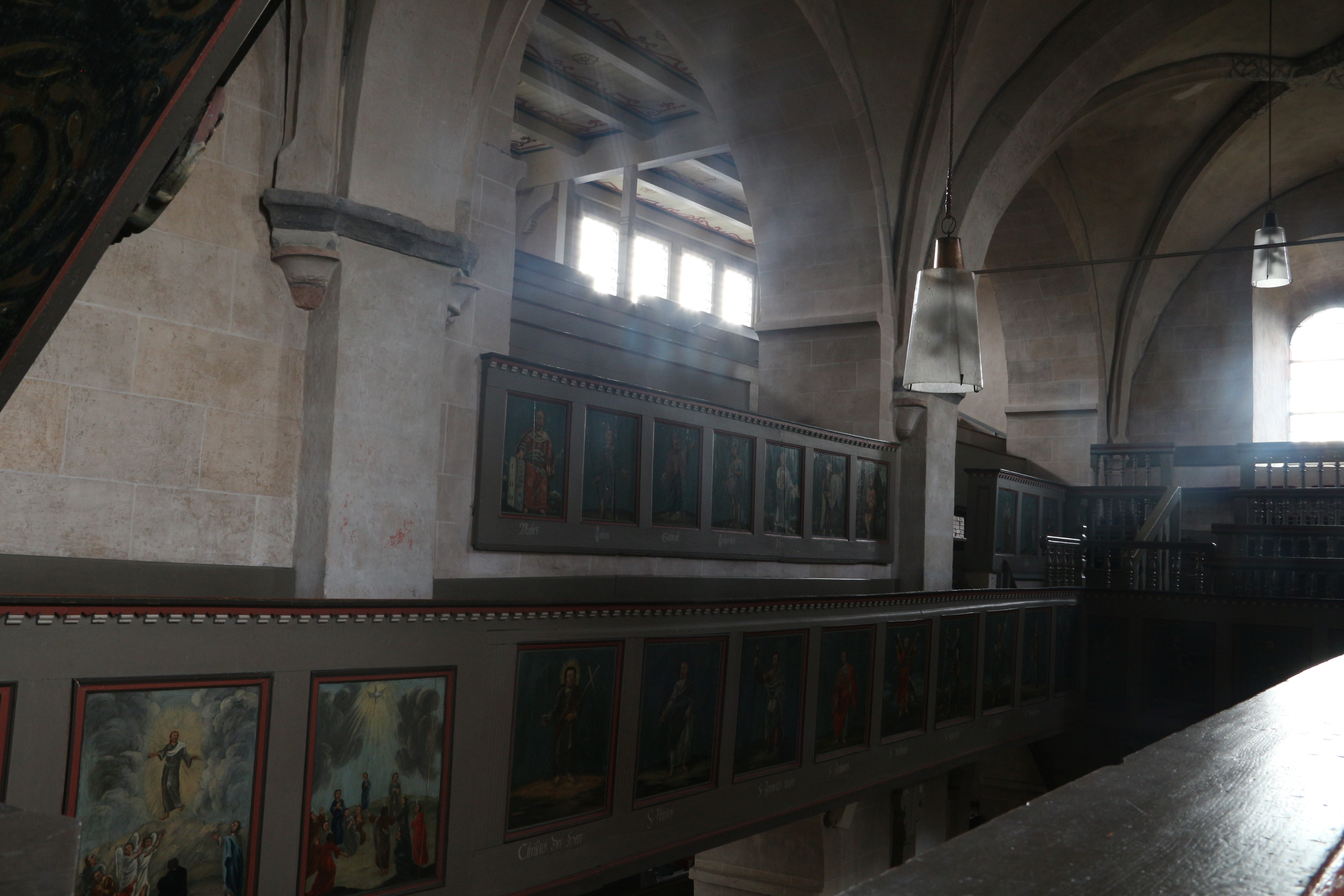 Blick von der Empore etwa über der Kanzel auf die Emporenerweiterung an der Südwand. Für die Erweiterung wurde, wie von außen gut zu erkennen, das Dach des südl. Seitenschiffs abgetragen und die Emporenerweiterung mit einem neuen Dach aufgesetzt